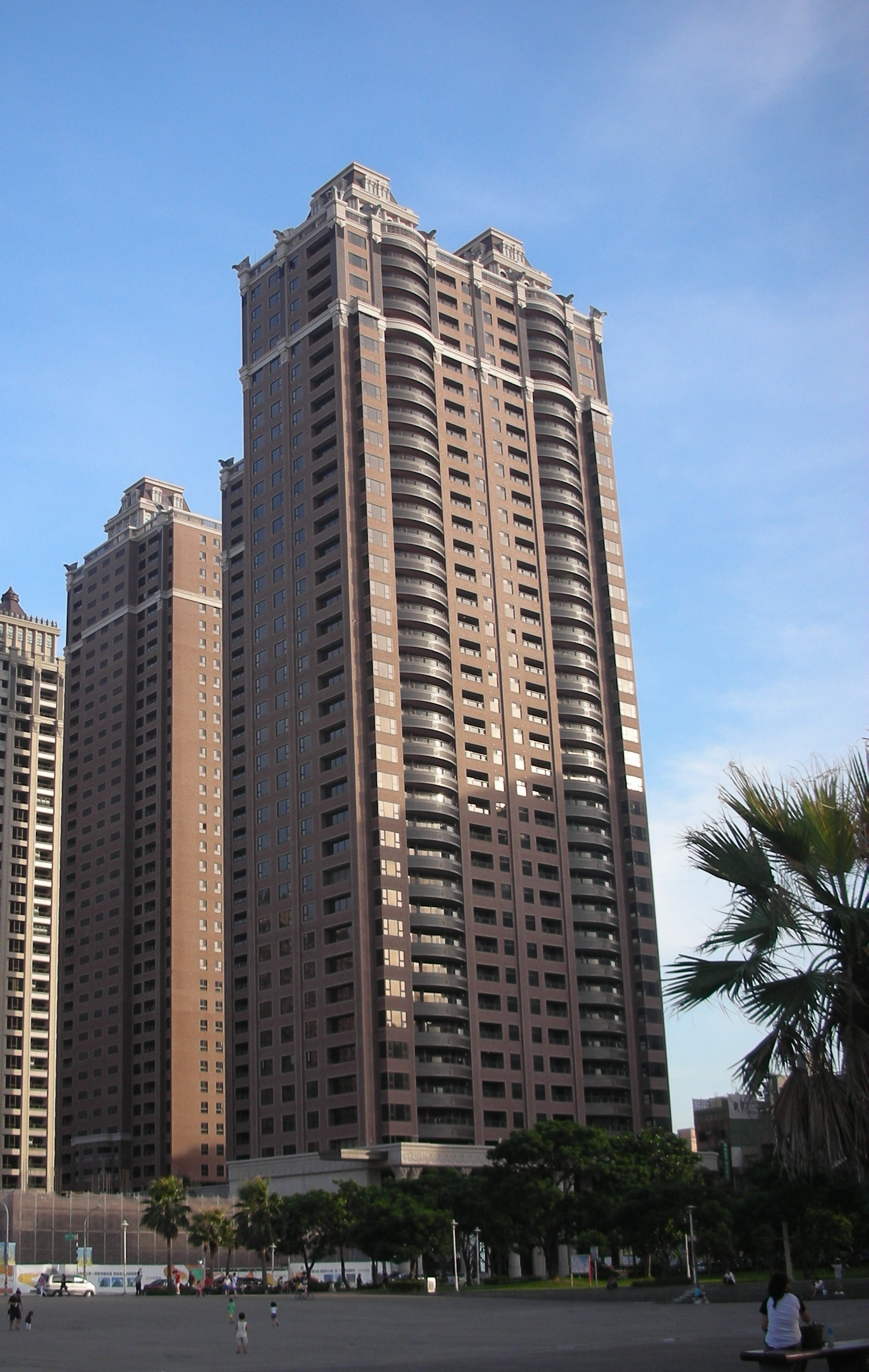 桃園市 中悅一品，現為桃園縣最高樓